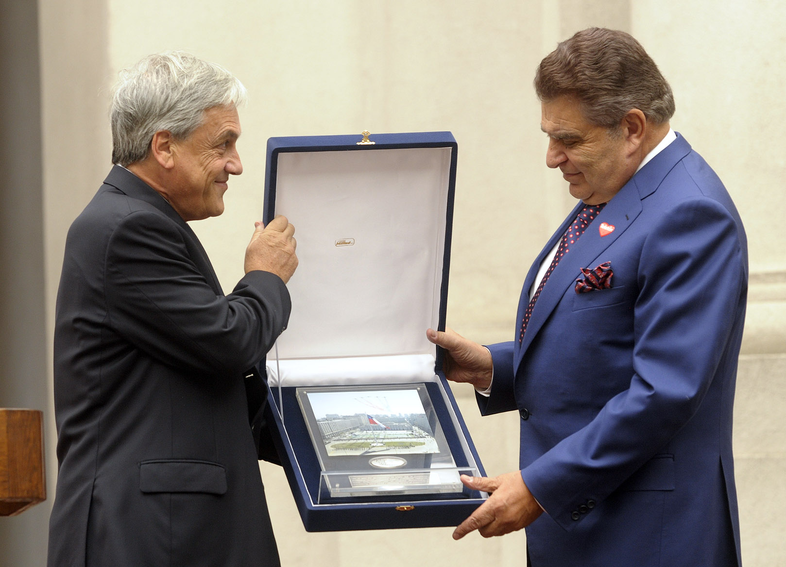 Gobierno chileno rinde homenaje a Don Francisco. En la foto, Sebastian Piñera (izquierda) y Don Francisco (derecha)